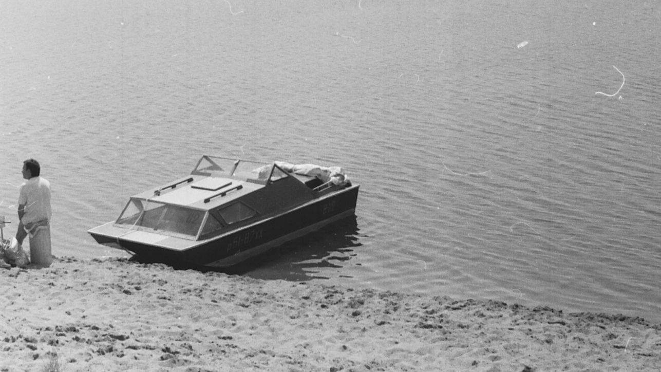 Самодельный катер на Амуре, 1998 год